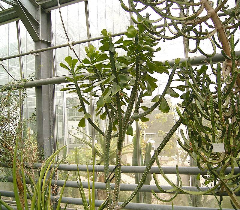 Euphorbia desmondii BG Bochum, Germany